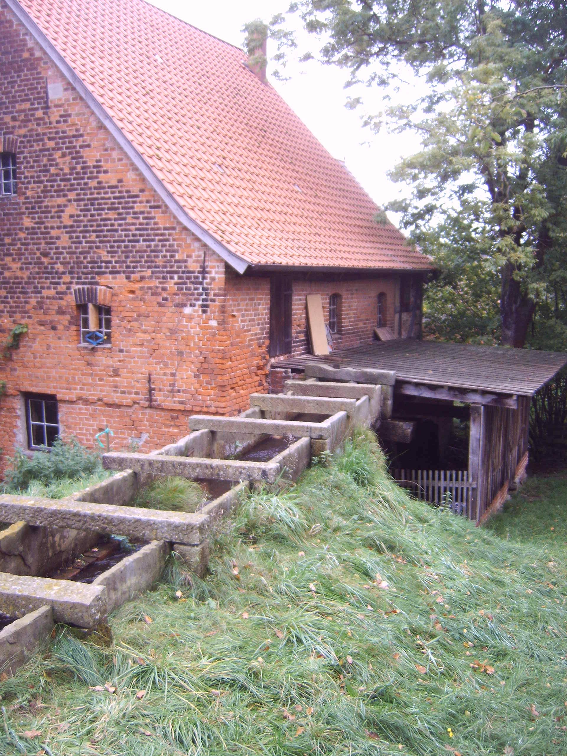 Wasserführung zur Reichwaldschen Mühle in Wiepke, Sachsen-Anhalt, Deutschland